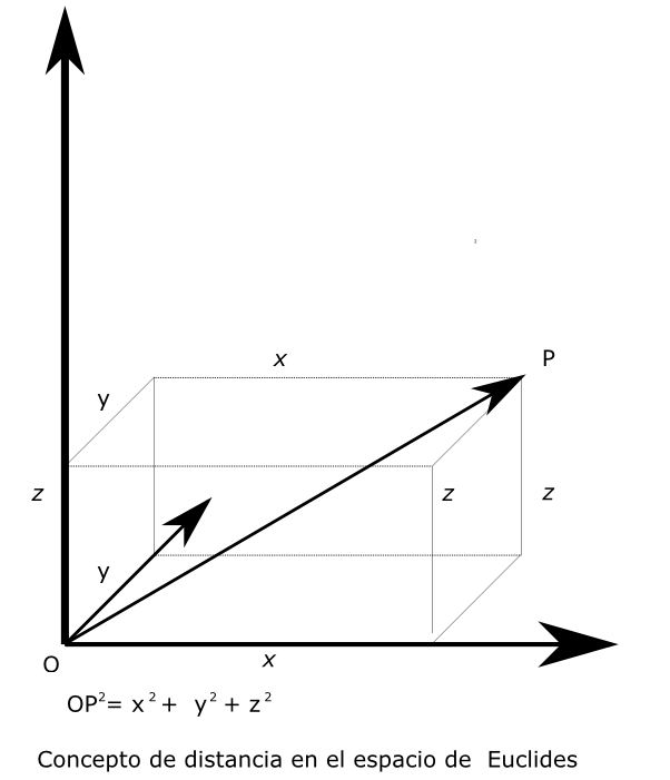 Concepto de distancia en un espacio de tres dimensiones